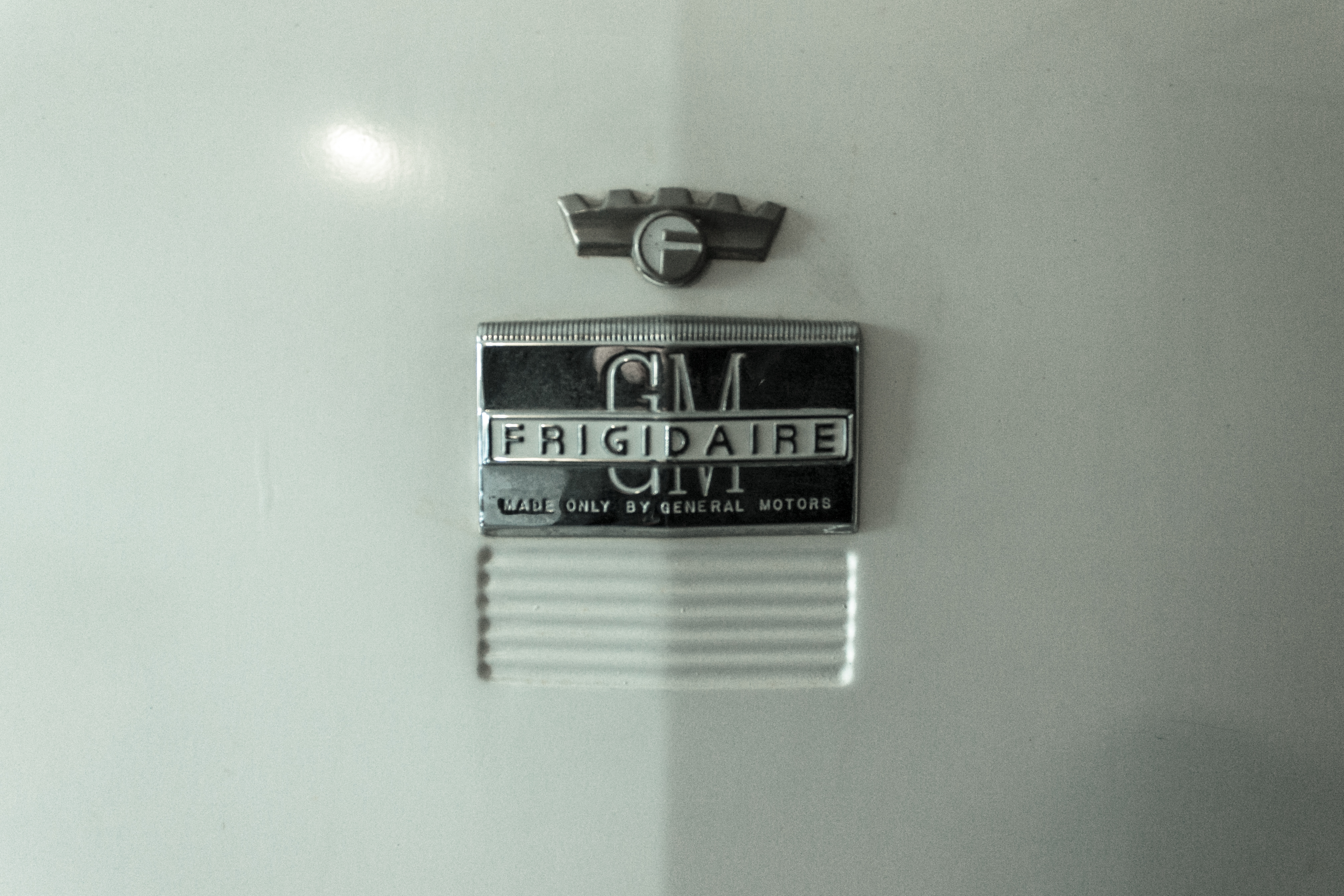 Rolli Days